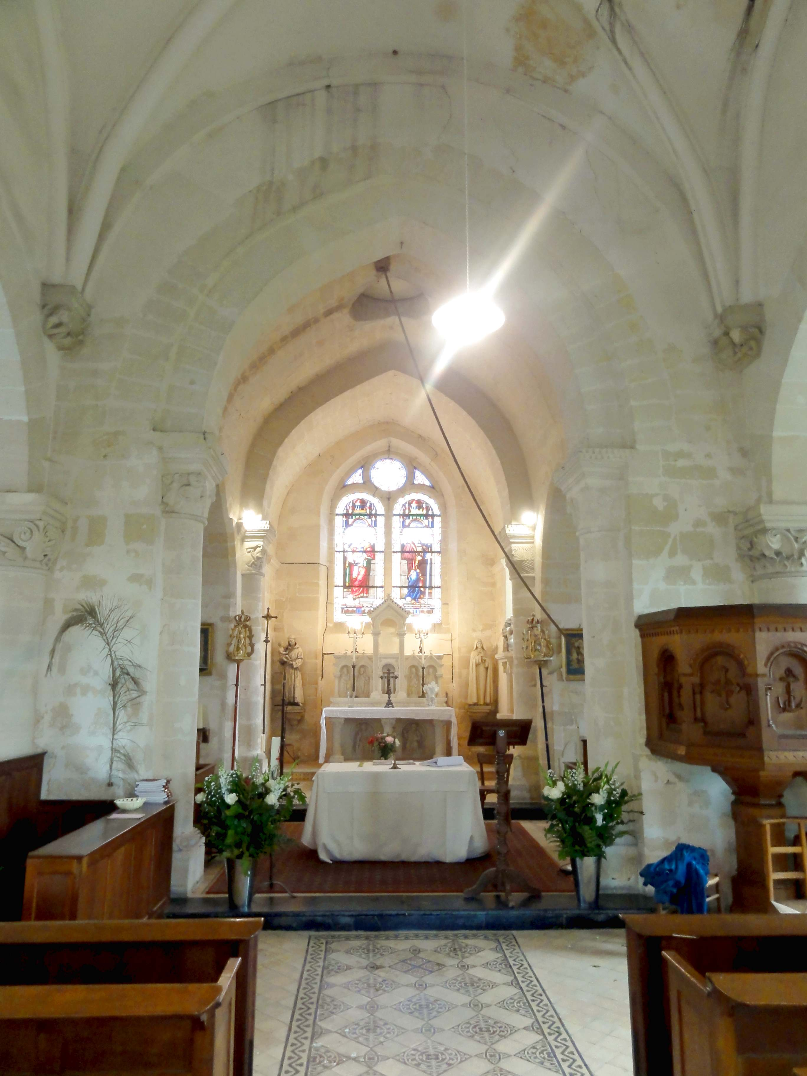 Intérieur de l'église - voir titre.